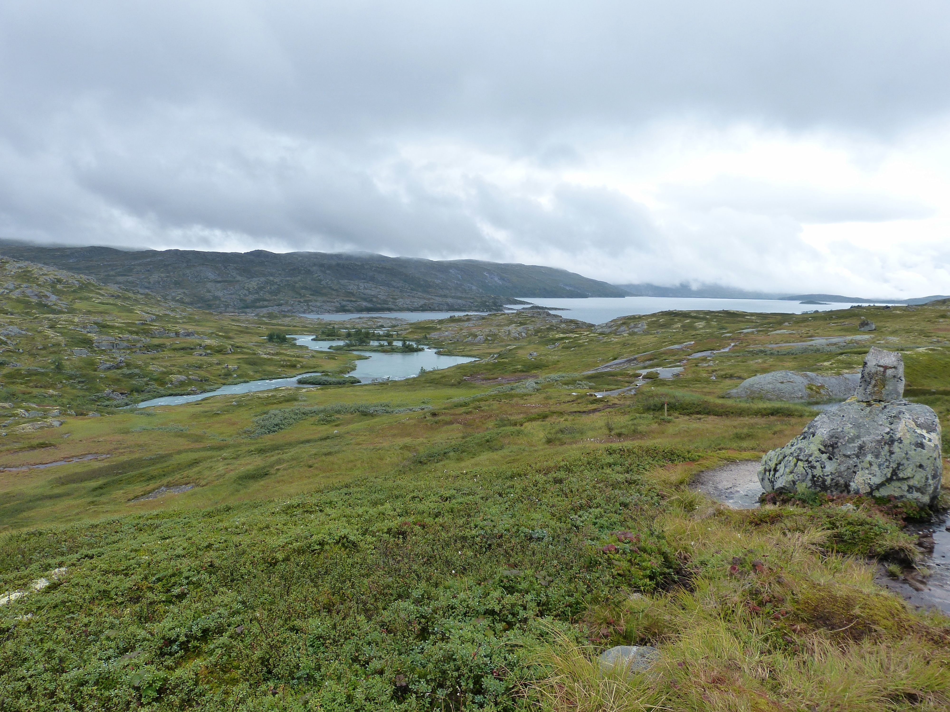 Tag 3: Der Leiro und seine Mündung in den Sysenvatnet. Dieser See ist nur noch auf 900 m Höhe. Deshalb wachsen dort unten auch einige Bäume, ein seltener Anblick in der Hardangervidda. Dieser Wegabschnitt war ungeheuer sumpfig und matschig, was das Vorwärtskommen extrem verlangsamte.